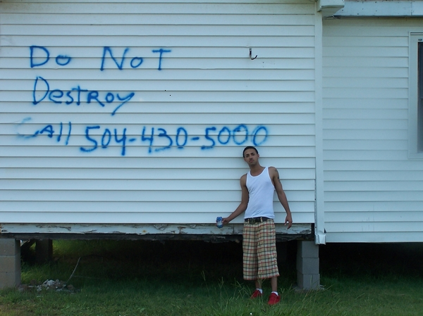 Davant Louisiana.